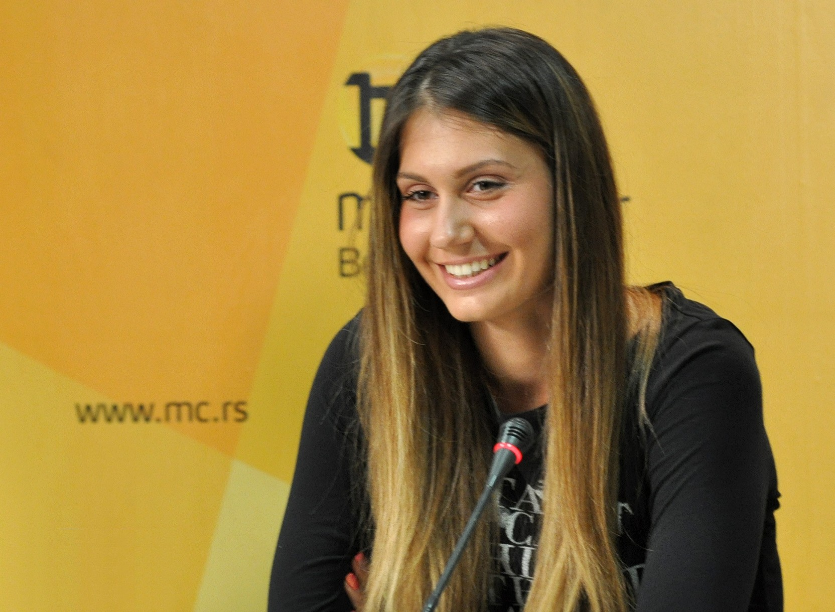 Jovana Jakšić